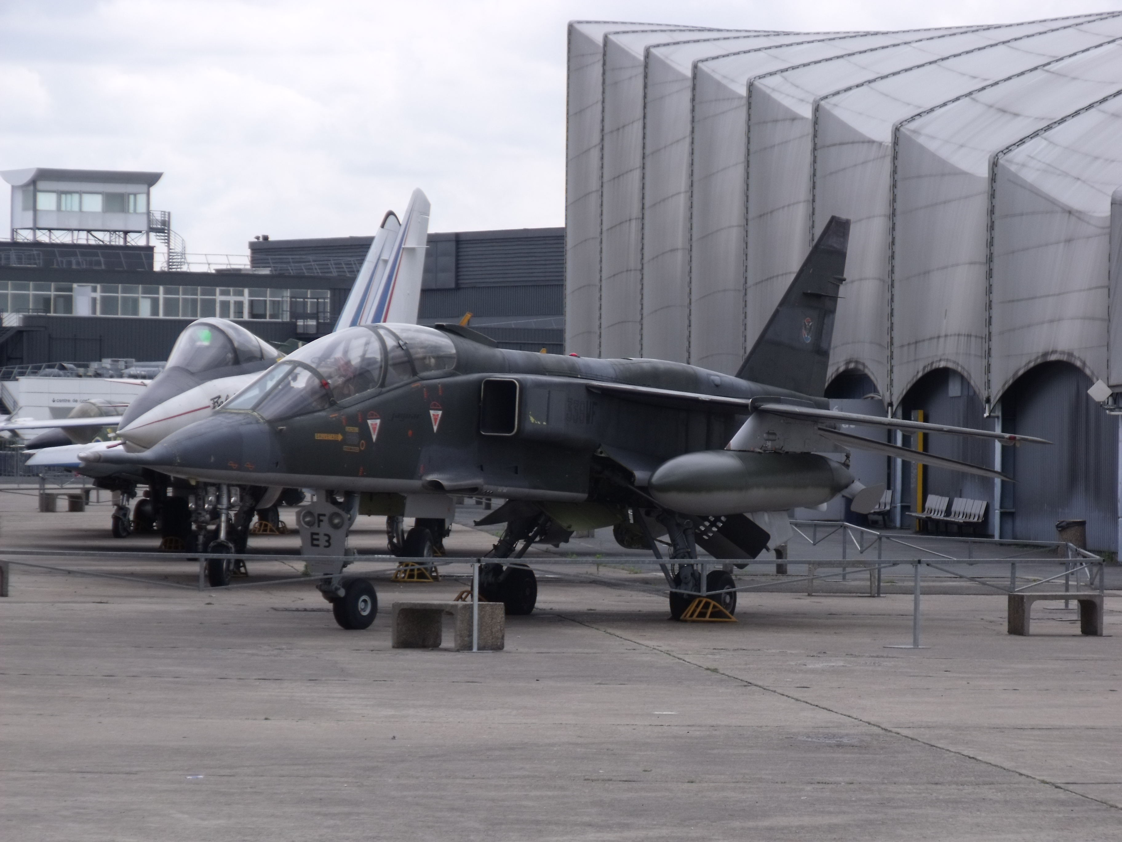 Ancien avion de l'Armée de l'Air